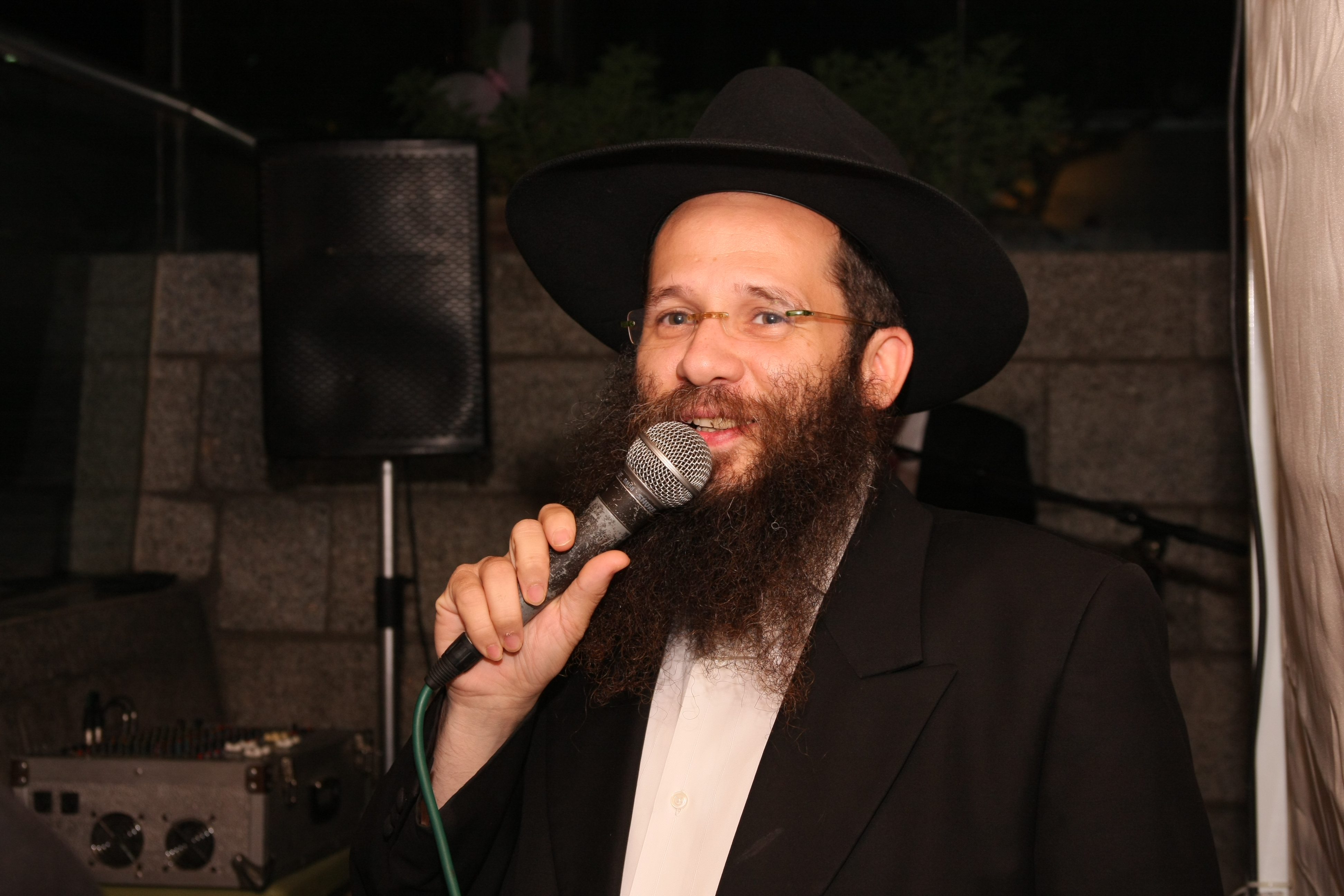 הרב ליפקין בנאום